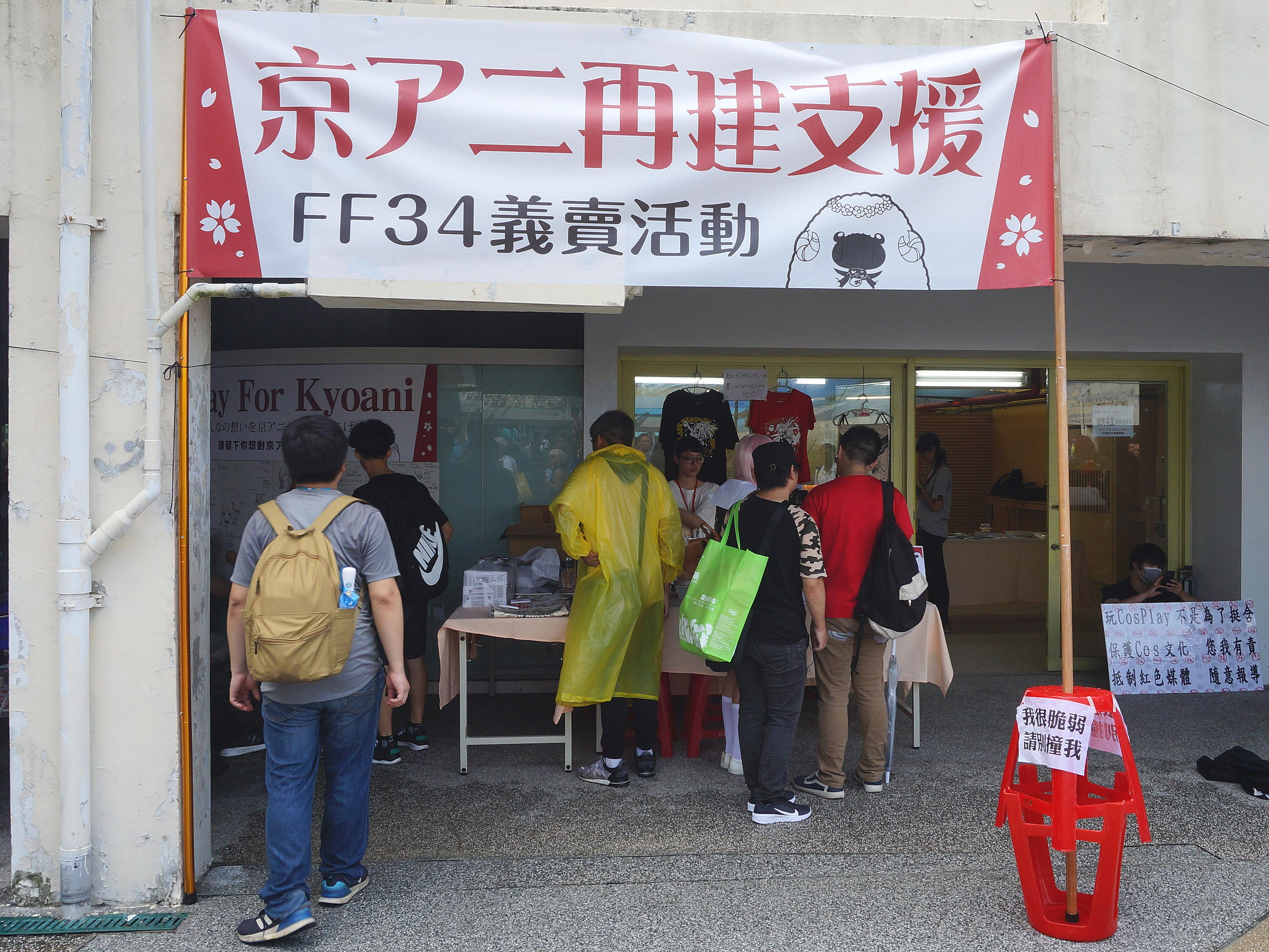 第34屆開拓動漫祭媒體接待處前，支援京都動畫重建的義賣會「京阿尼再建支援義賣活動」。